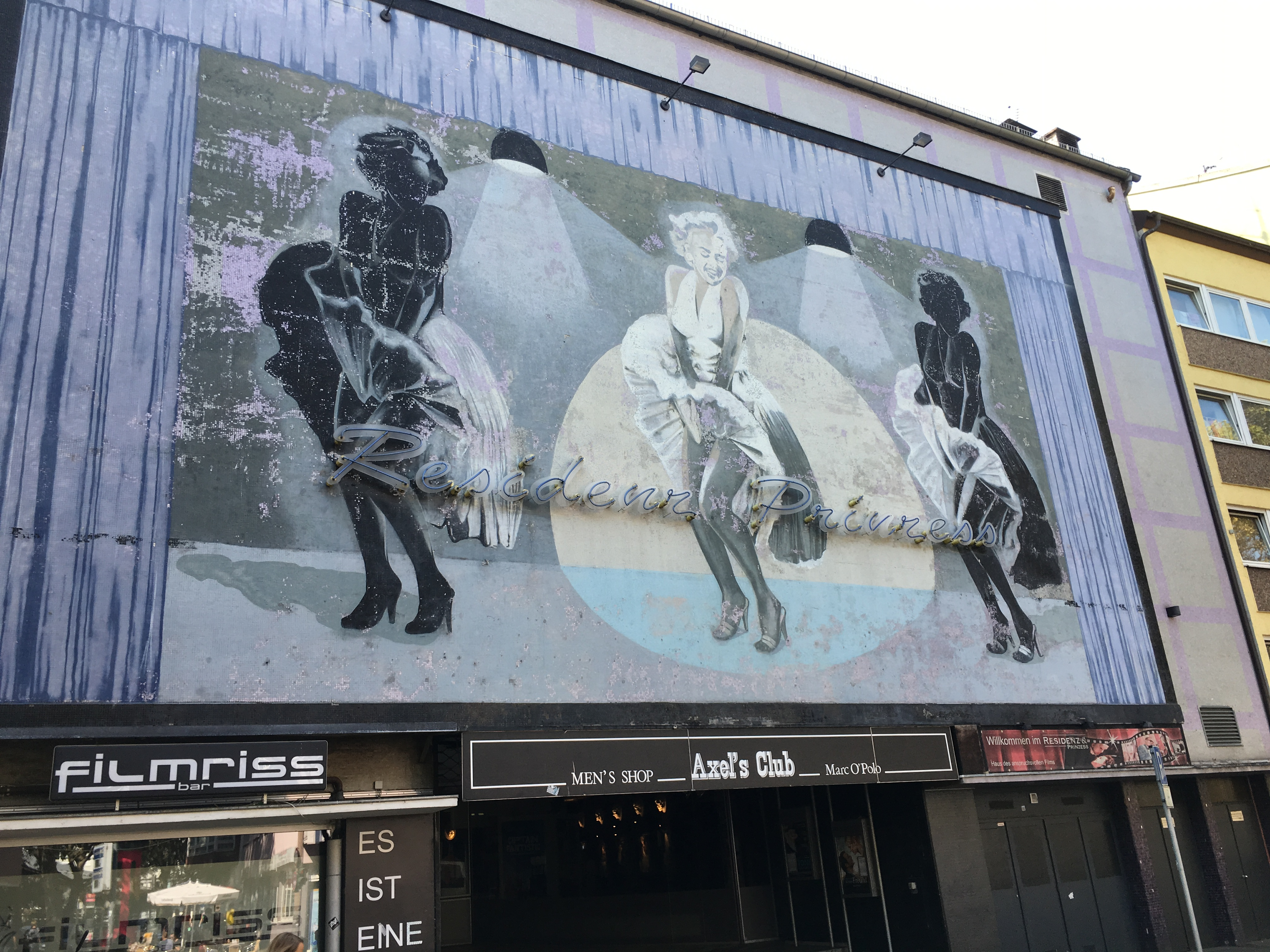 Mainz Prinzess Kino